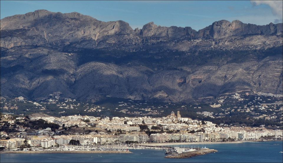 Altea y Bernia.